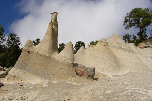 Paisaje Lunar de Granadilla en el interior del Parque Natural de la Corona Forestal, Tenerife.